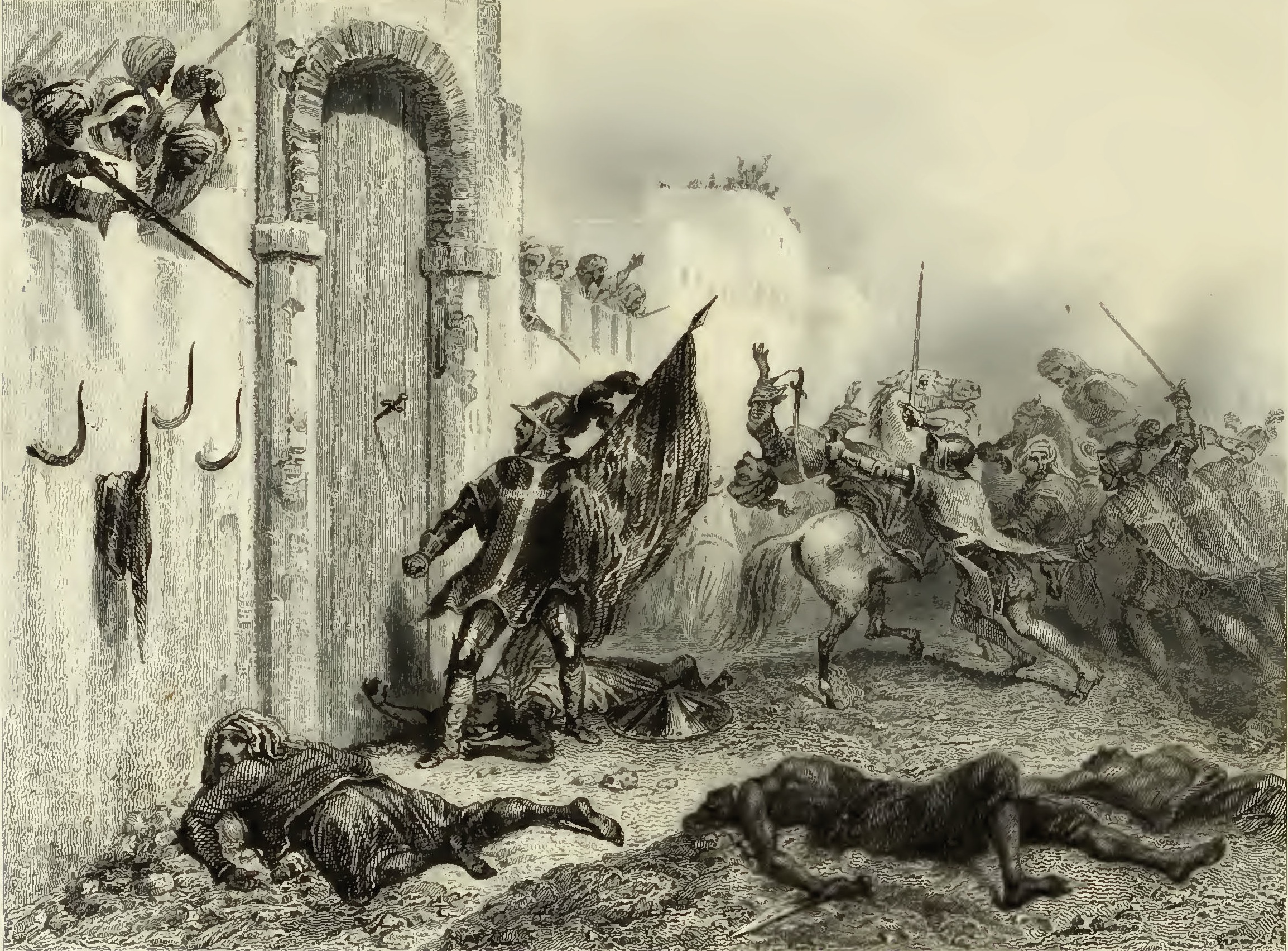 Un chevalier de malte de la langue de France enfonce son poignard dans la porte de Bab-azoun